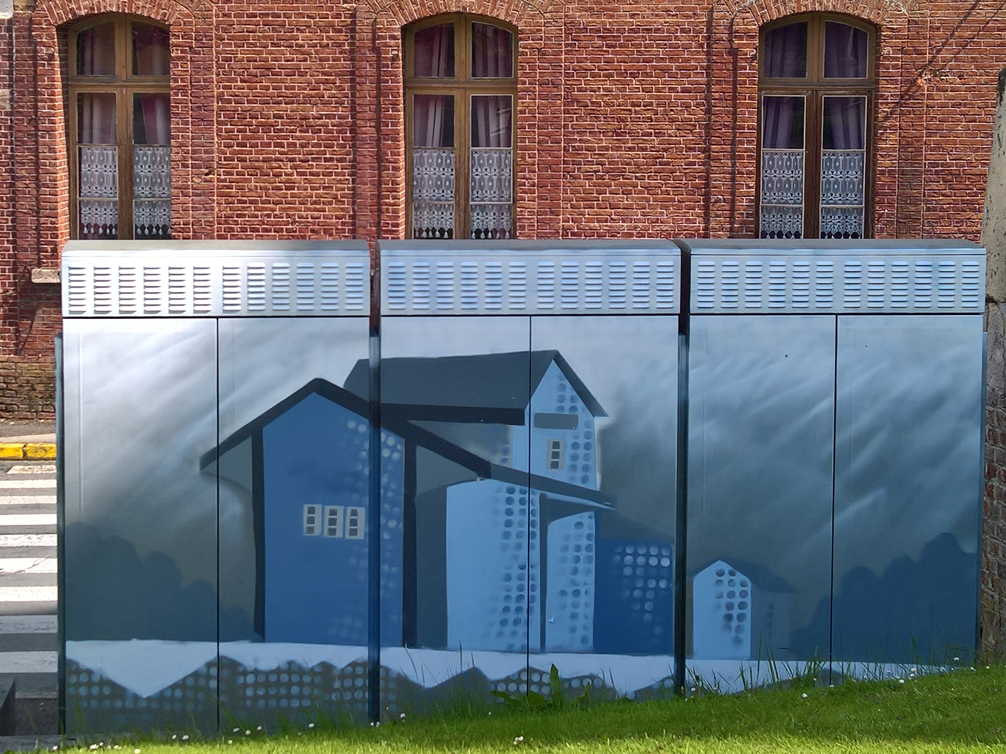 Liomer : Décoration de mobilier urbain, sur le côté de l'église, représentant la gare de Liomer - Brocourt, sur la ligne d'Amiens - Aumale - Envermeu (Chemins de fer départementaux de la Somme)